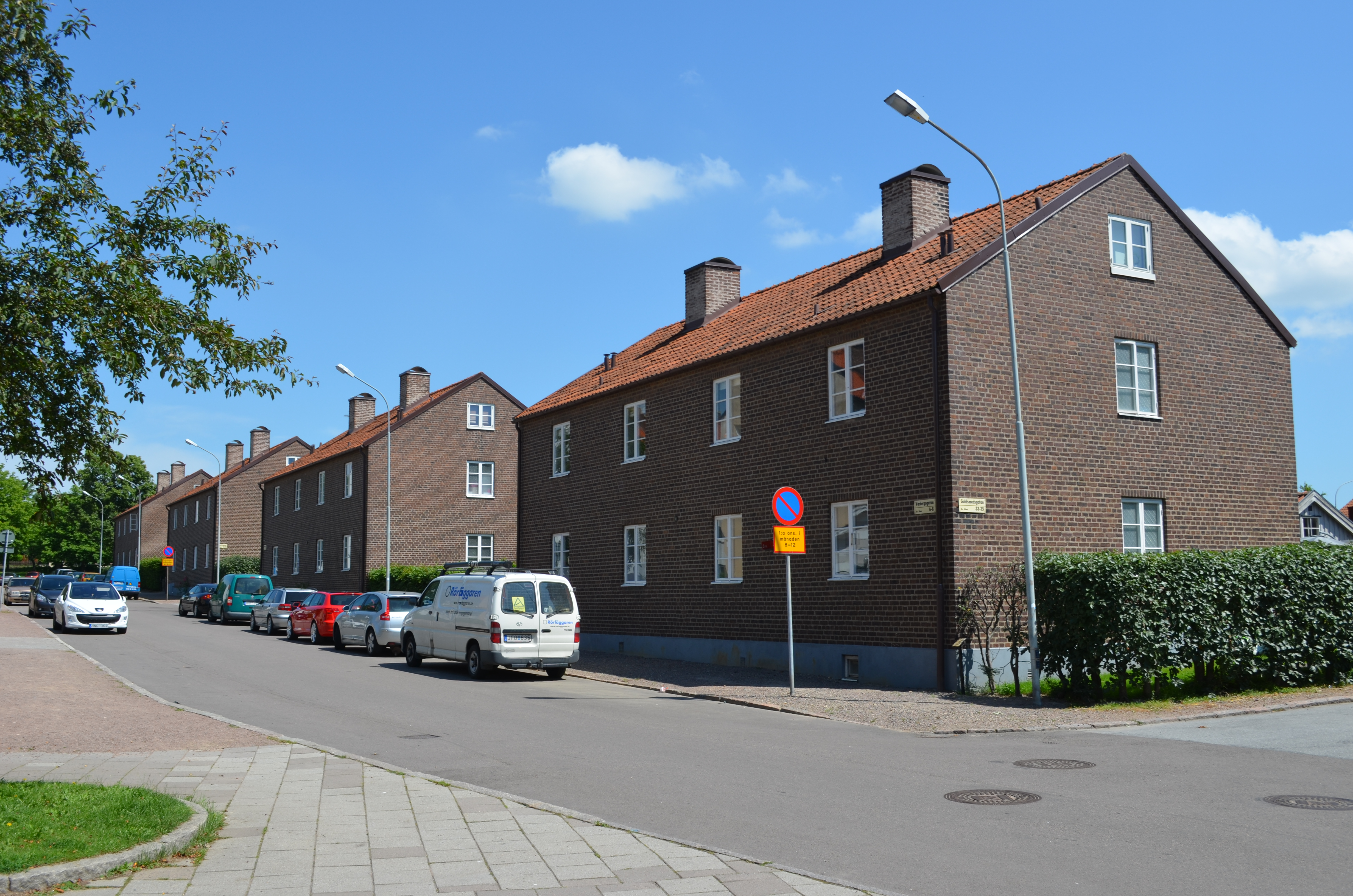 Egnahem vid Varbergsgatan i Helsingborg, arkitekt: Sigurd Lewerentz.